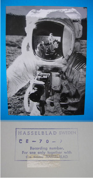 Bild från samlingen "Ten Years In Space". Beställd av Nasa och stämplad med unik kod.